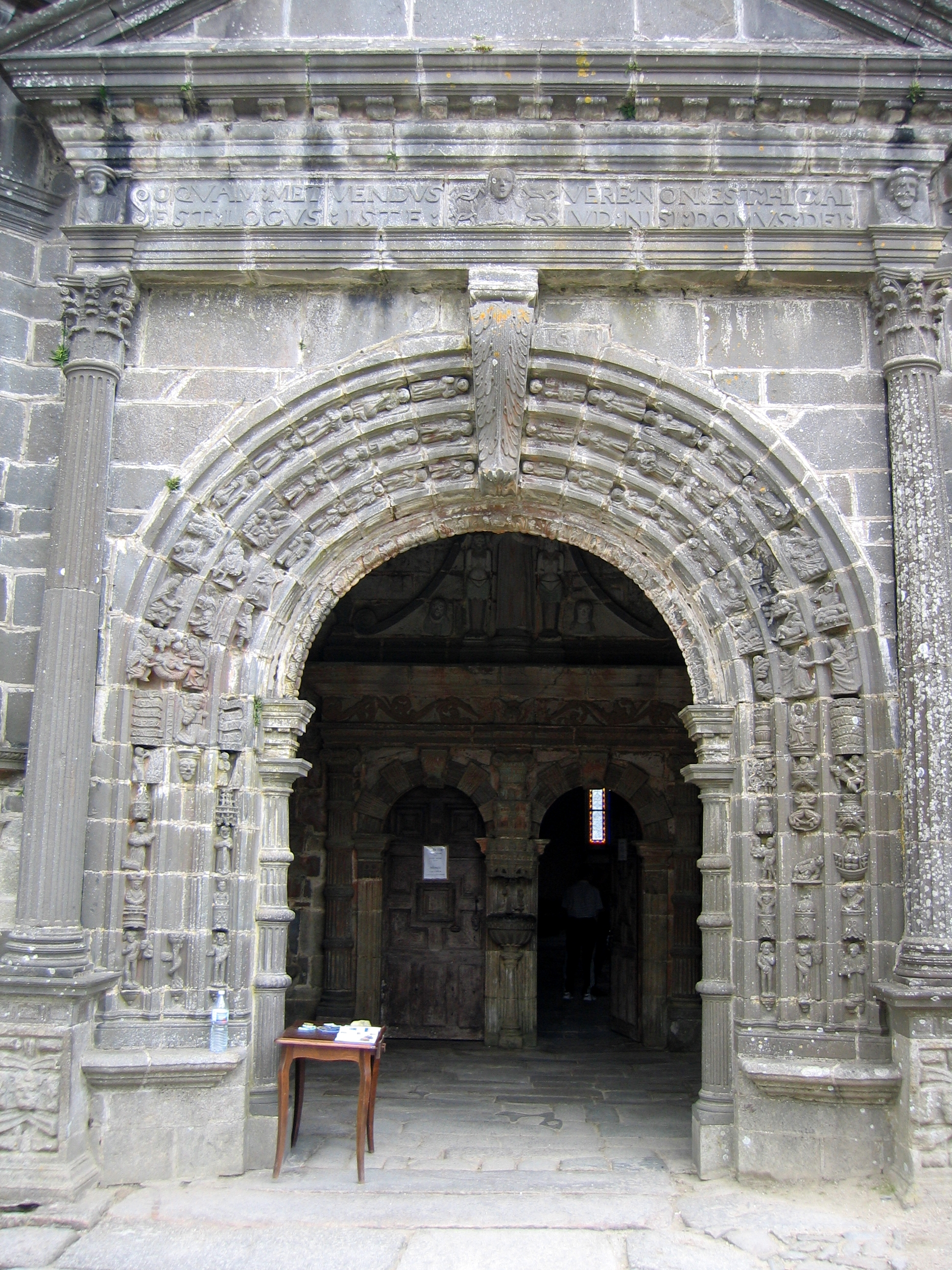 Entrée de l'Eglise de Guimiliau